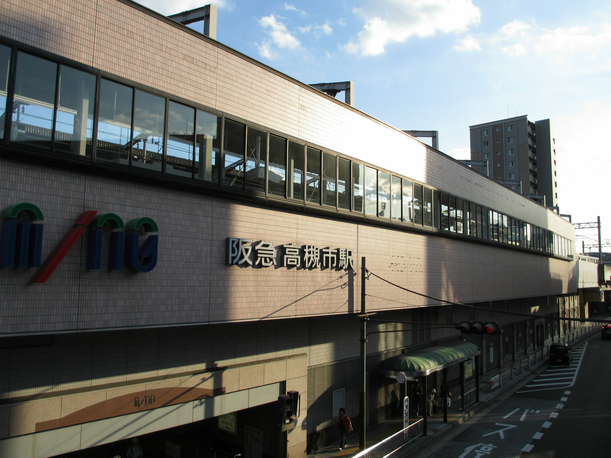 Hankyu Takatsukishi Station